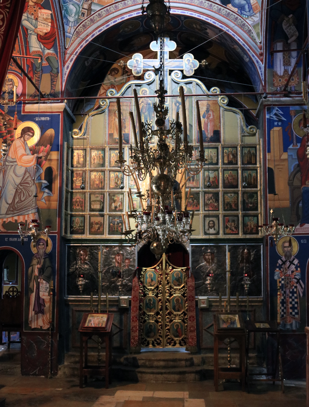 Ikonostas Manastira Krka1